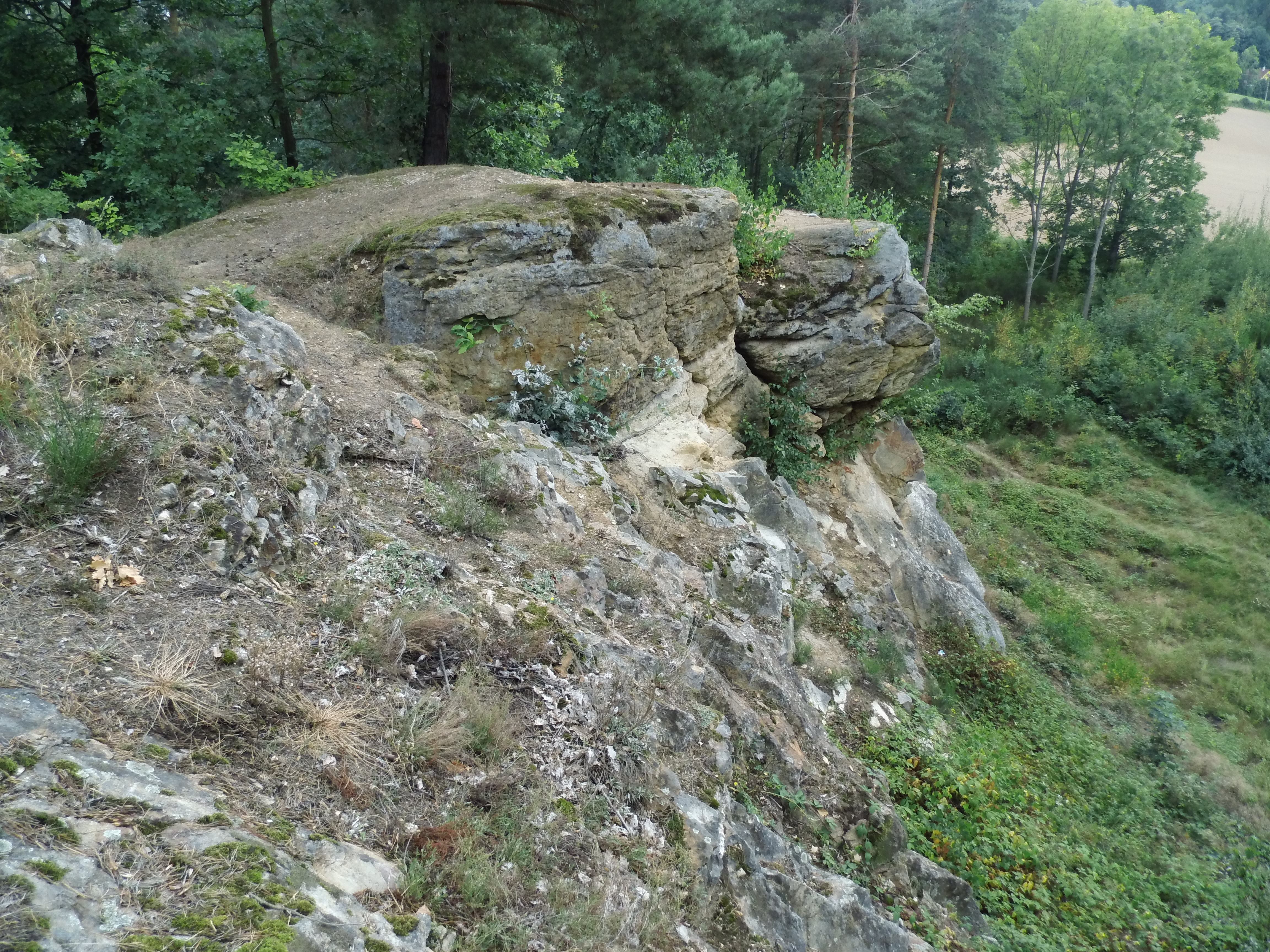 sklaní stěna z horního pohledu